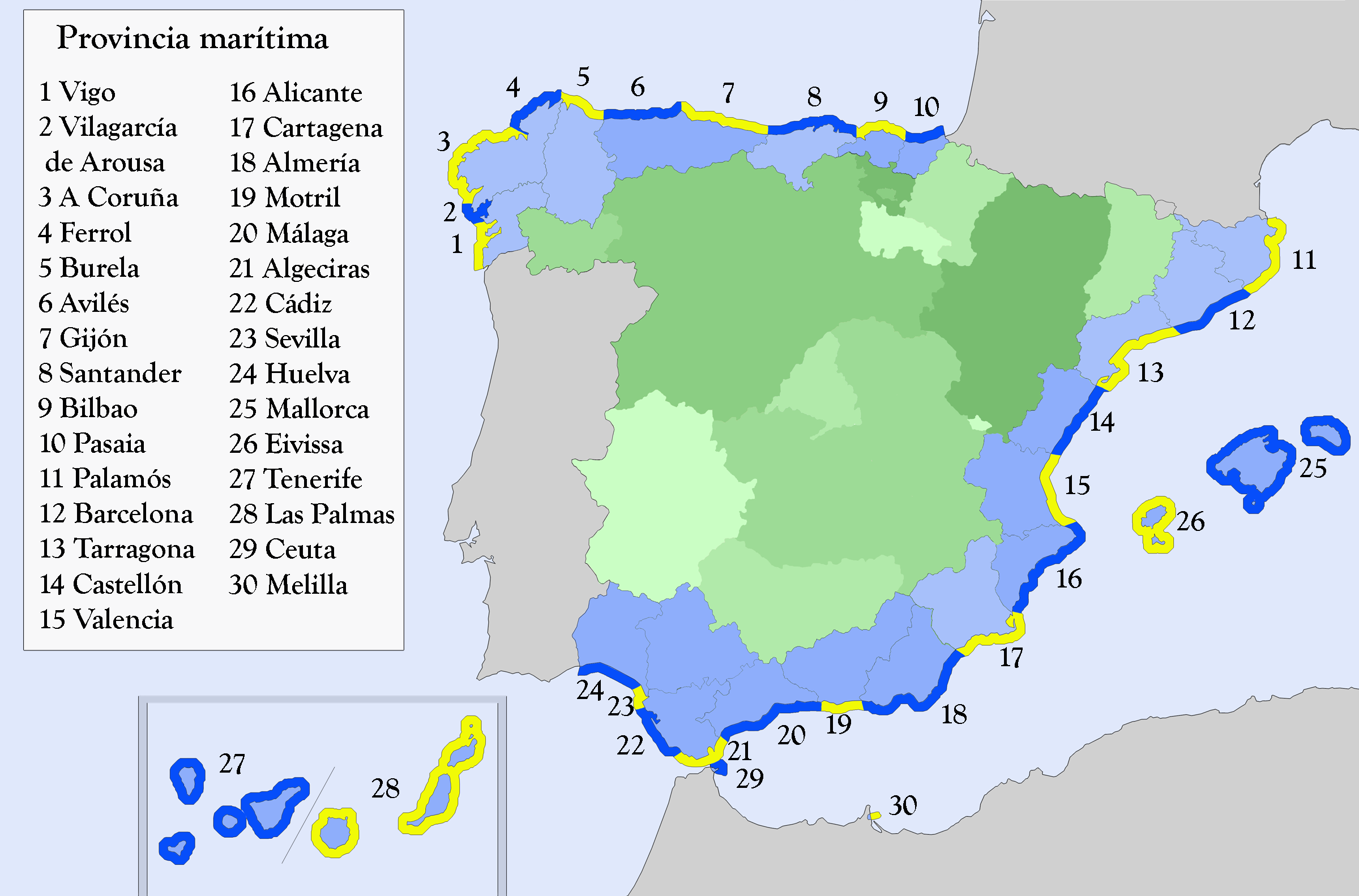 Mapa indicativo de la localización de las treinta provincias marítimas en las que se organiza el litoral de España.